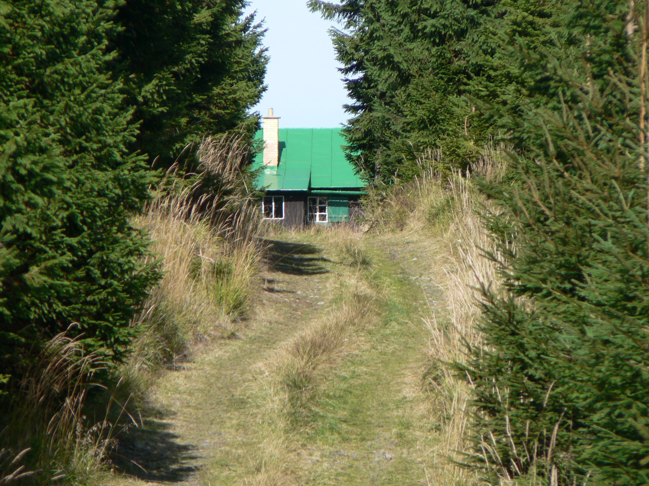 Maloklinecká lovecká chata na Malém Klínu, Hrubý Jeseník